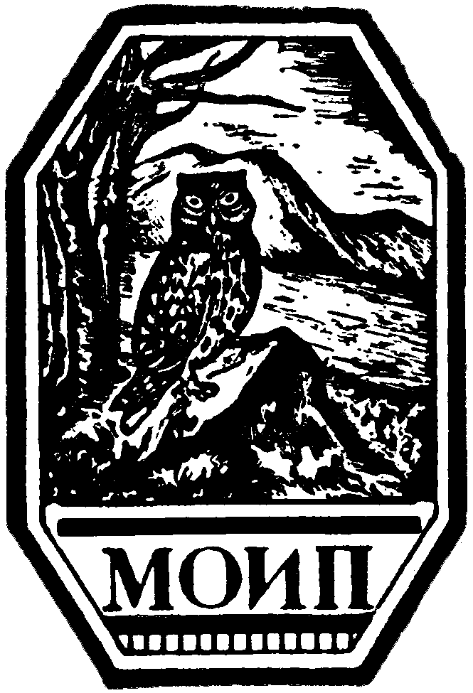 Московское общество испытателей природы - эмблема